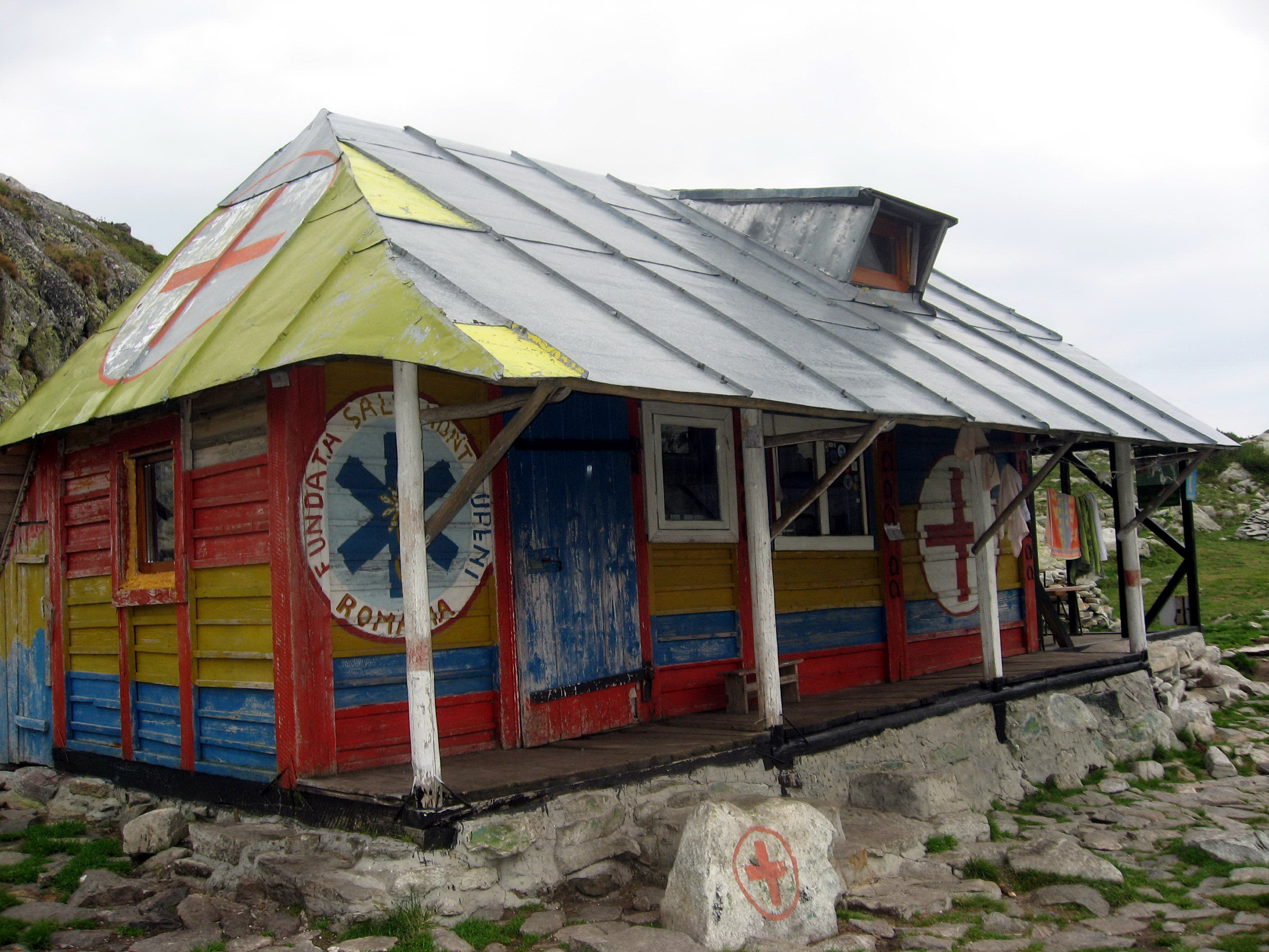 Chata záchranářů u jezera Bucura